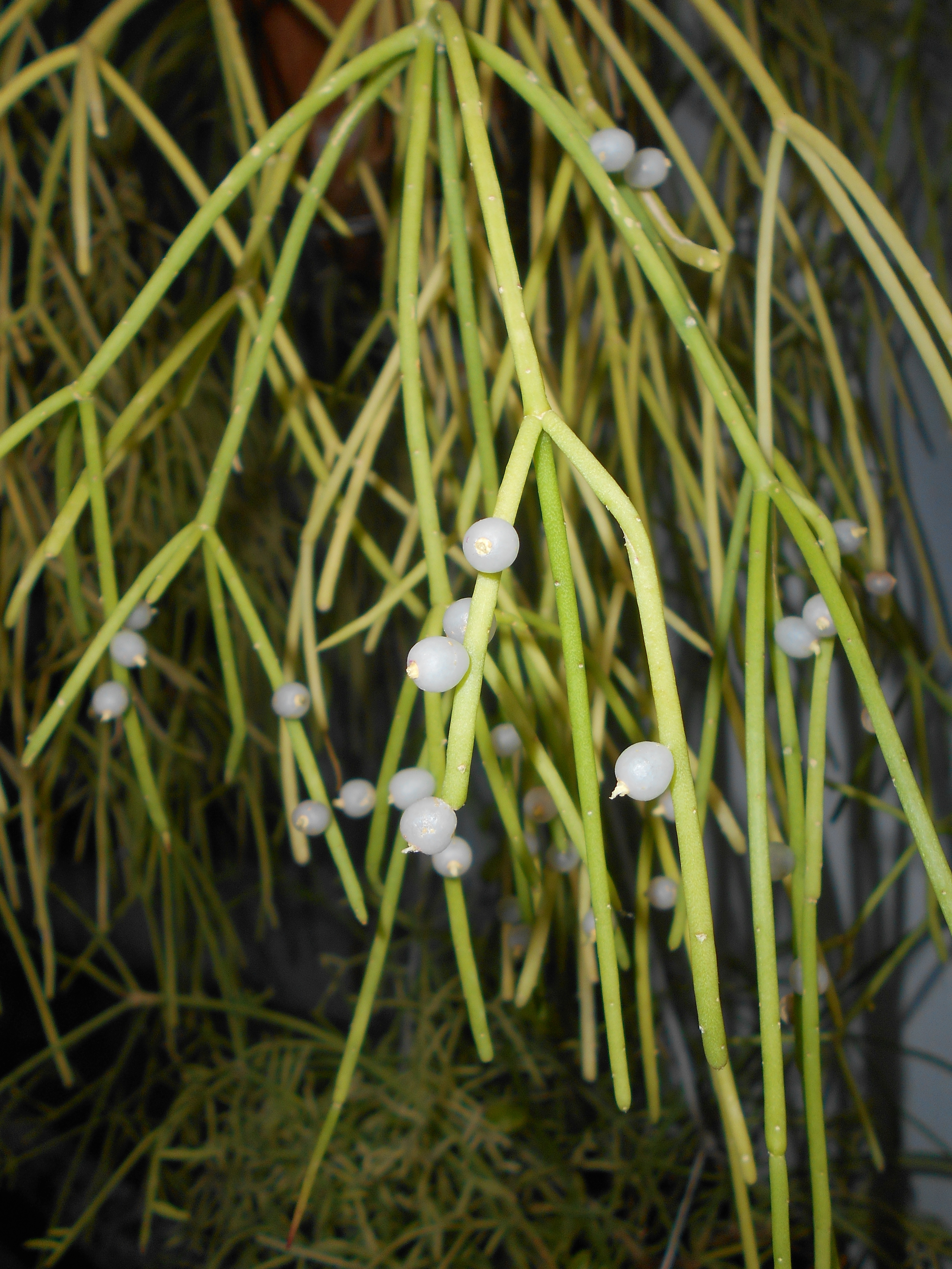 Rhipsalis baccifera, Ogród Botaniczny Uniwersytetu Jagiellońskiego w Krakowie.